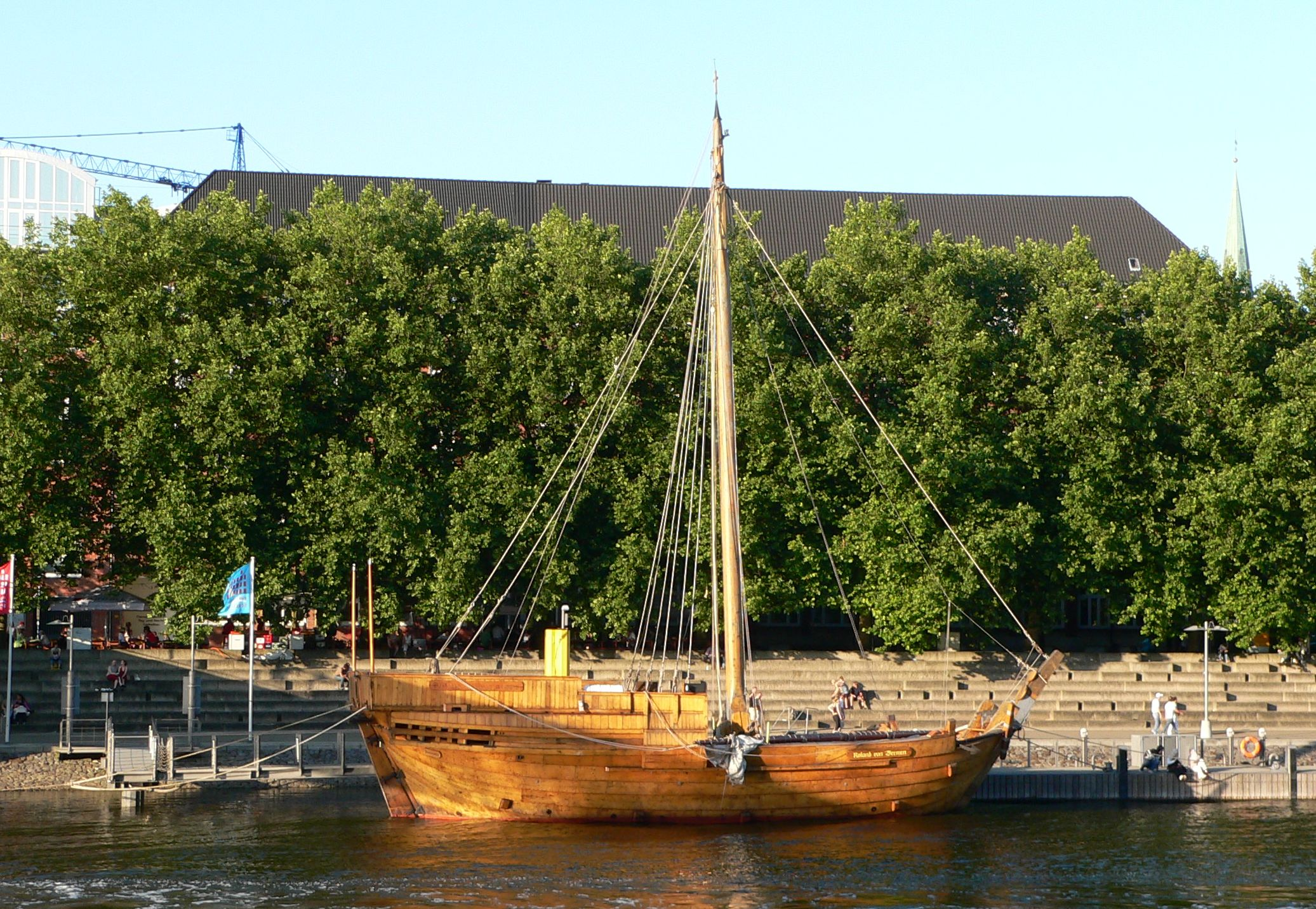 Hansekogge „Roland von Bremen“ am Schlachte-Anleger in Bremen, Nachbau einer Hansekogge